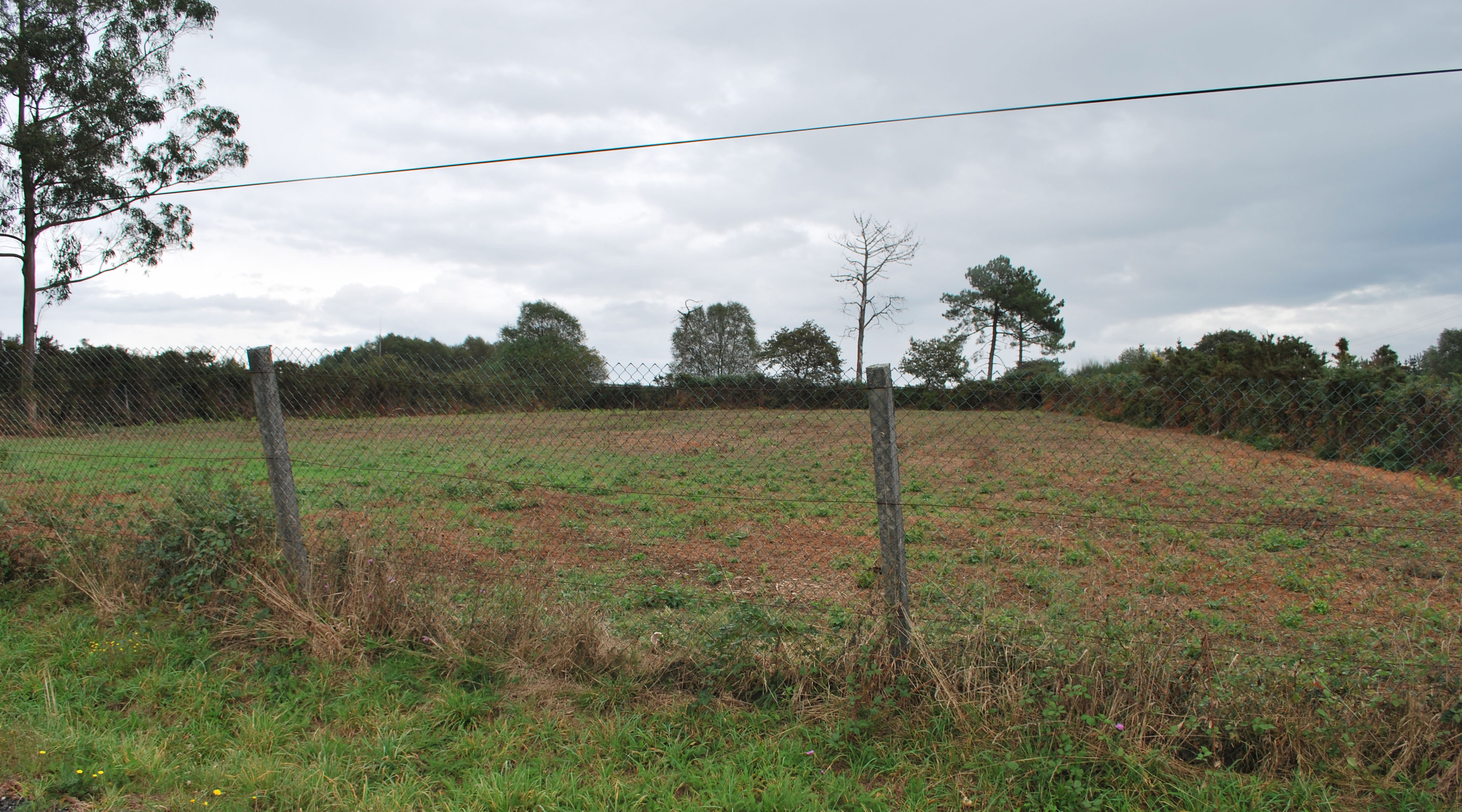 Vista da Mámoa de Guiliade en Barbeito concello de Vilasantar en verán de 2013 A Coruña Galiza Spain